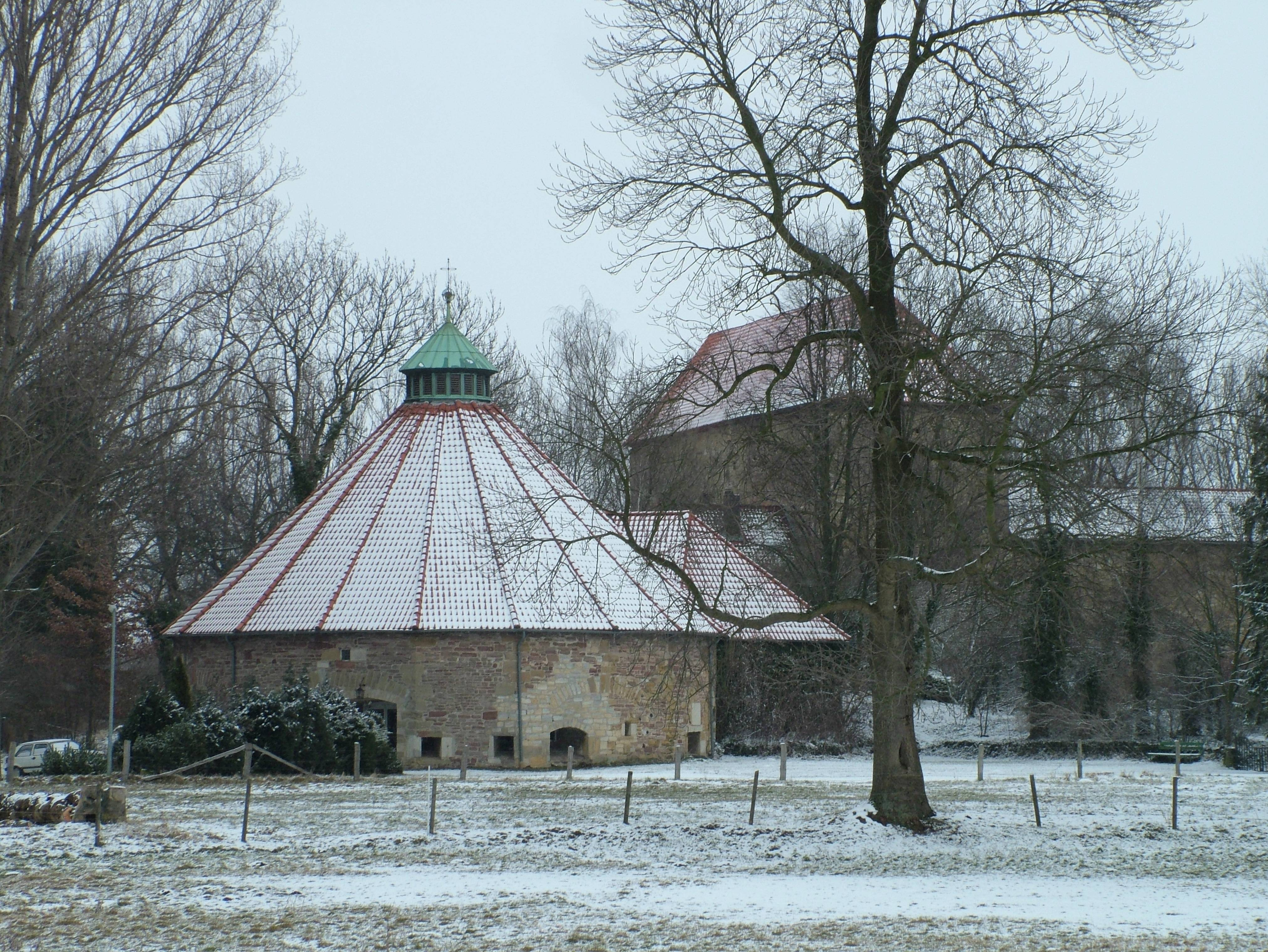 Steinbrück in Niedersachsen. Die heutige Kirche Kehrwiederkirche war ein Batterieturm einer Burg.